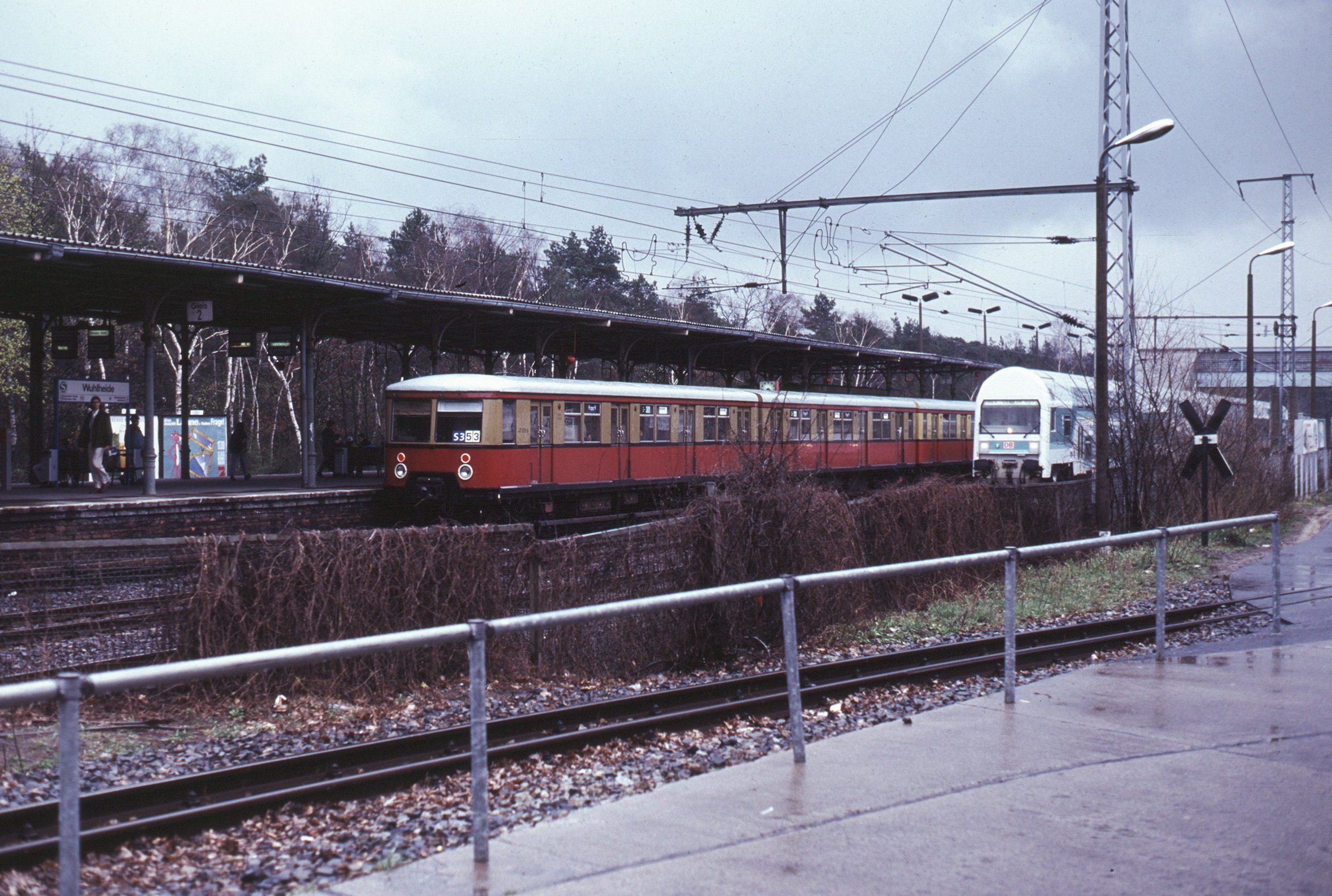 Bahnhof Berlin-Wuhlheide